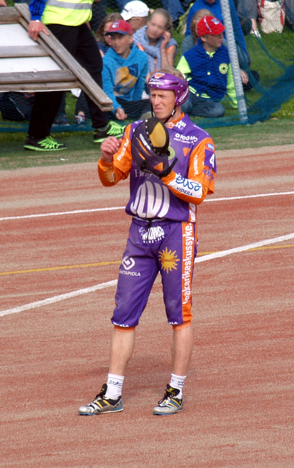 Jani Komulainen ottelussa Vimpelin Veto - Sotkamon Jymy (19.7.2015)